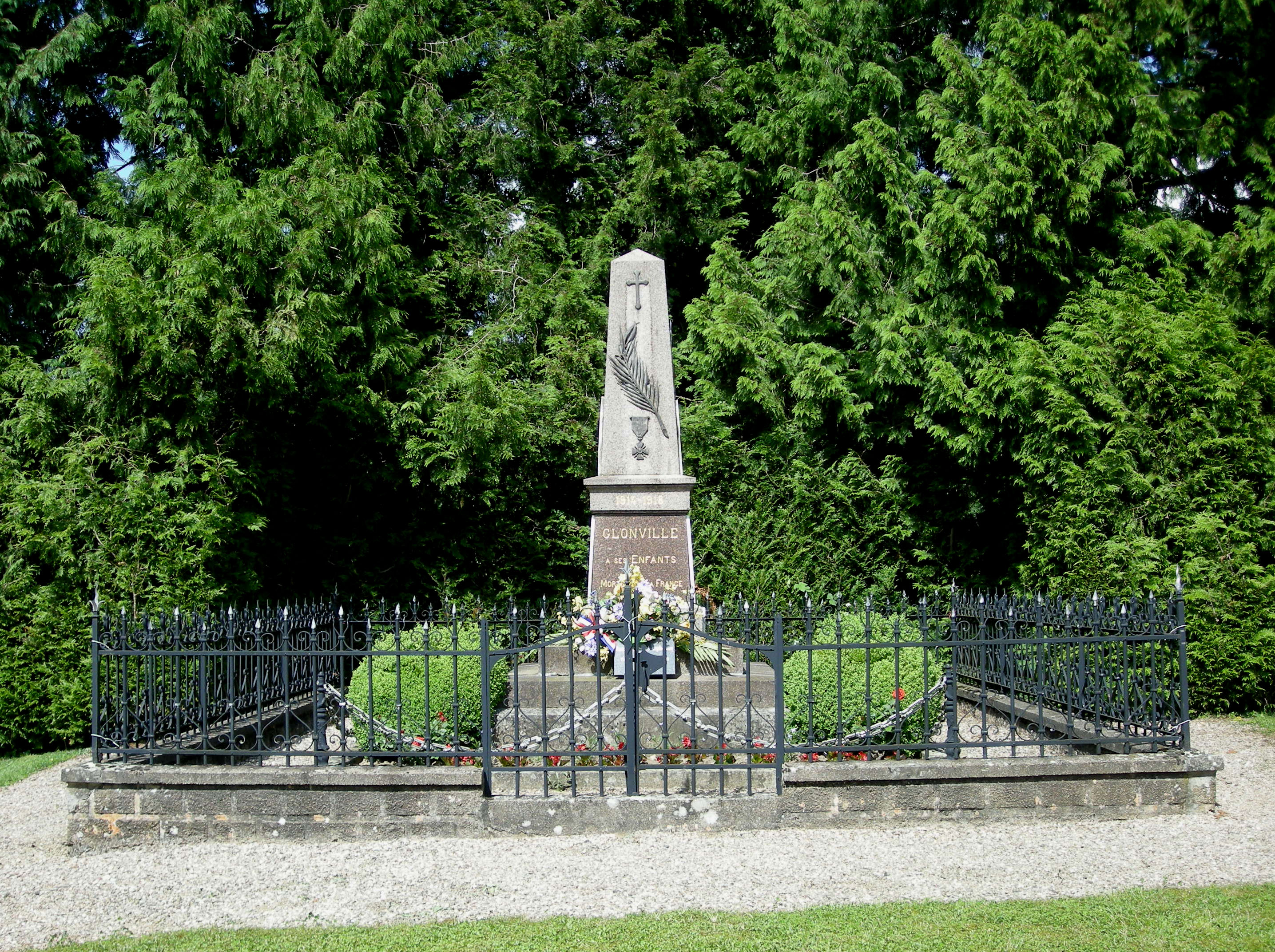 Près du cimetière, le monument aux morts de Glonville (Meurthe-et-Moselle)